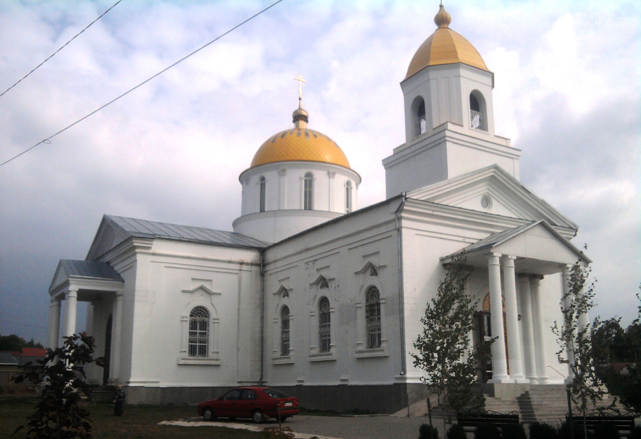 Вікіекспедиція у Буджак